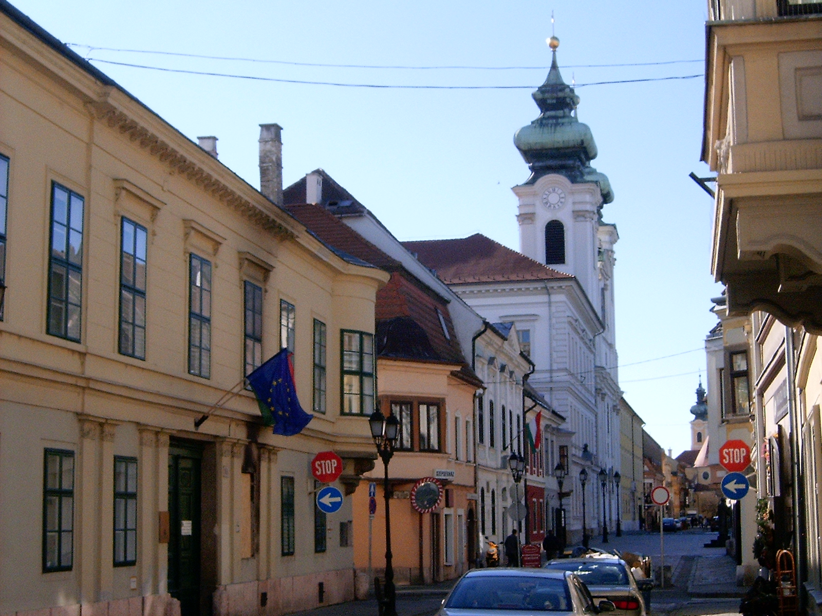 A győri Liszt Ferenc utca déli házsora (Győr-Moson-Sopron megye)